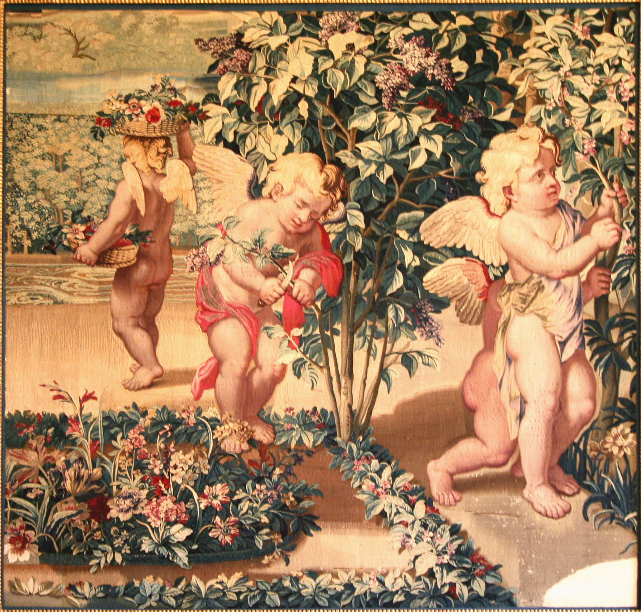 Tapisserie de la manufacture des Gobelins fin XVIIIe siècle représentant les enfants jardiniers en hiver. Musée Grobet-Labadié à Marseille.